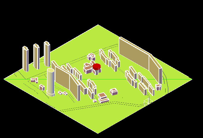 Osiedle Rusa w Poznaniu. Widok od strony południowo-zachodniej.